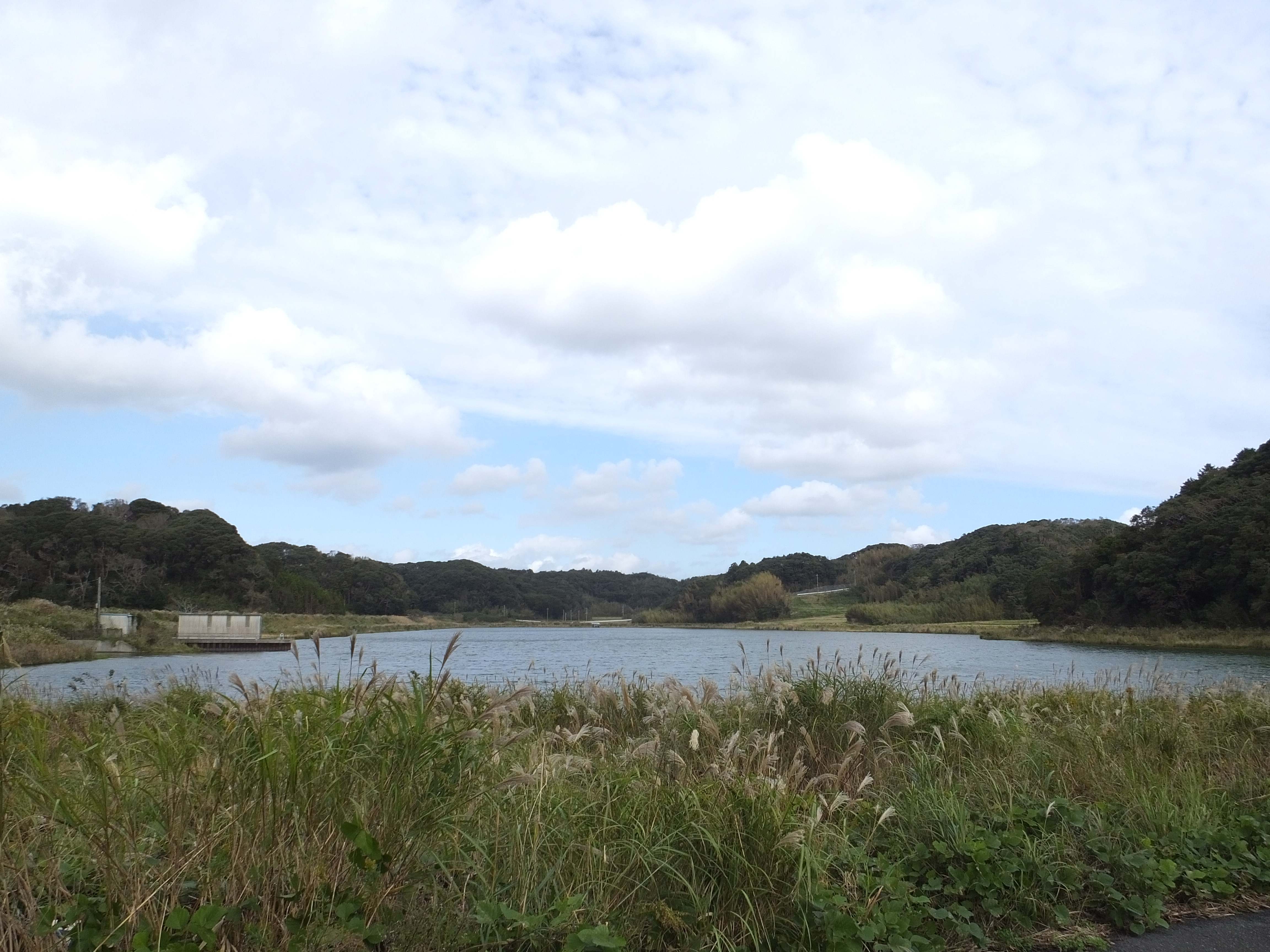 新川の水源である兼田貯水池（千葉県旭市）